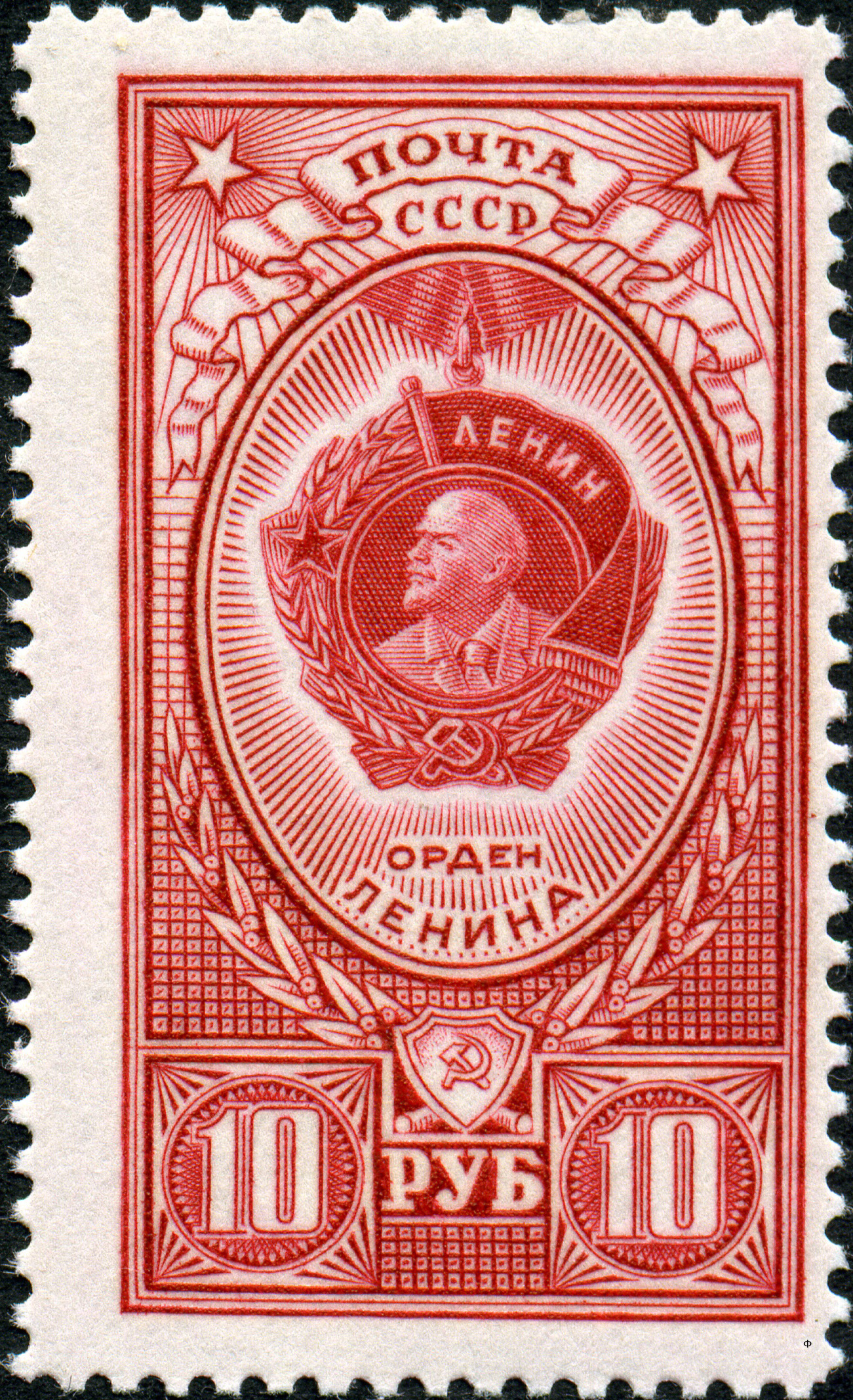 Марка СССР